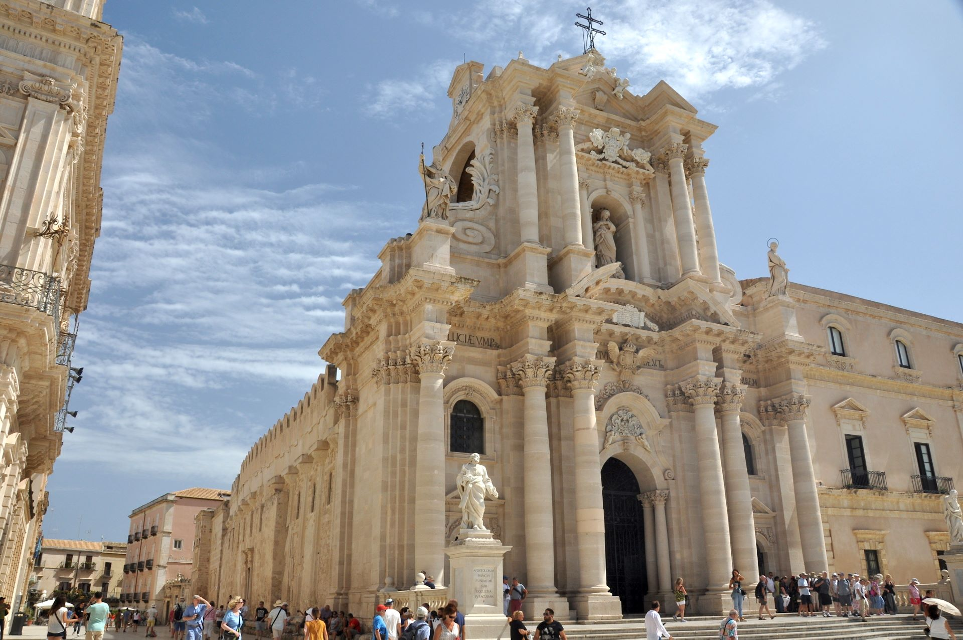 Syracus, Kathedrale Santa Maria delle Colonne